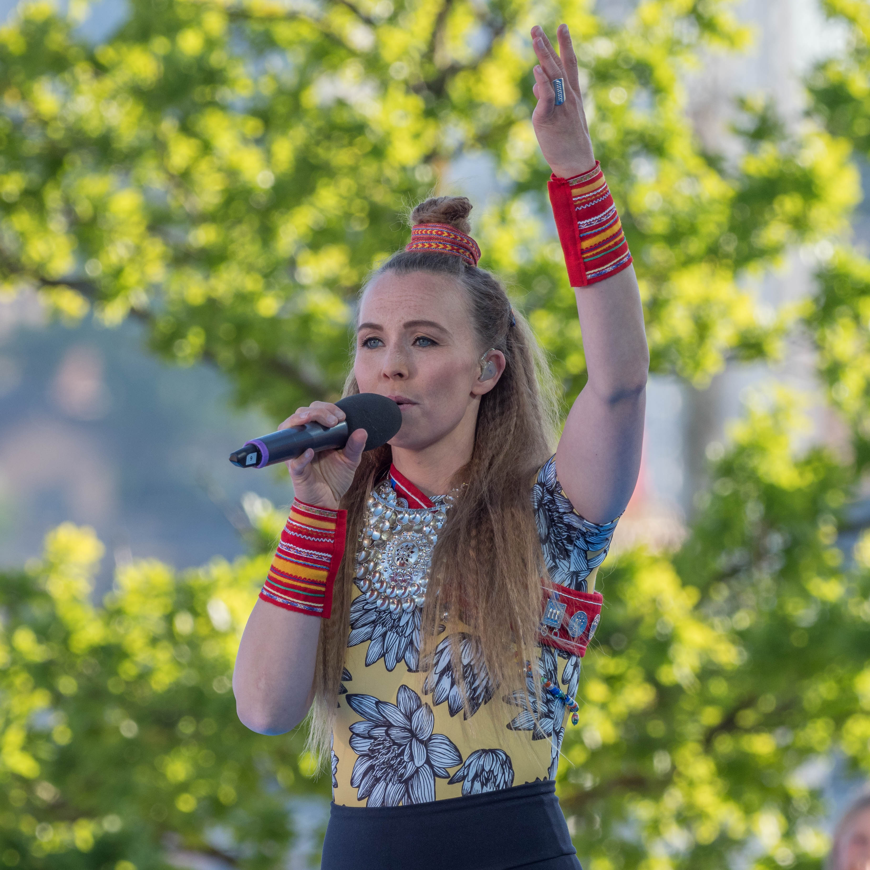 Sofia Jannok